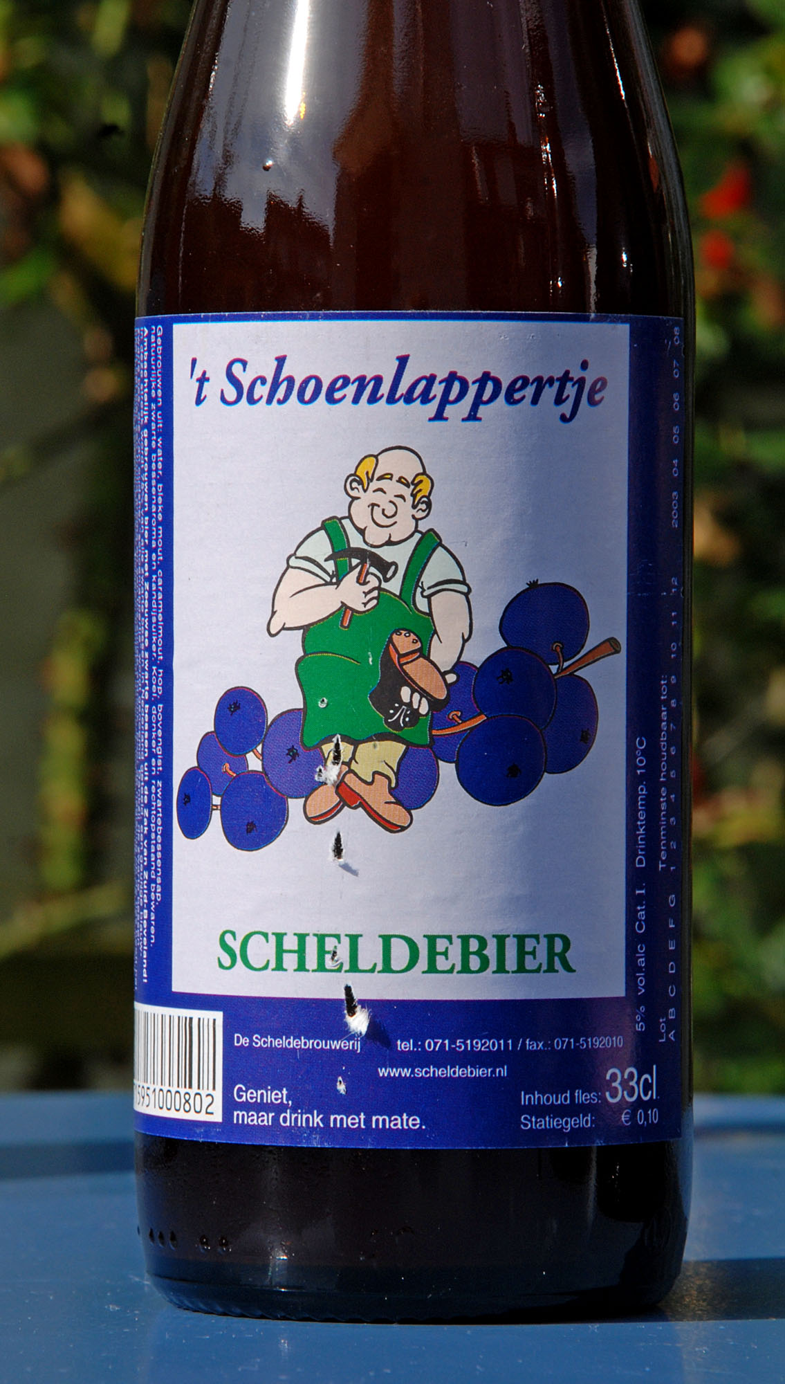 't Schoenlappertje